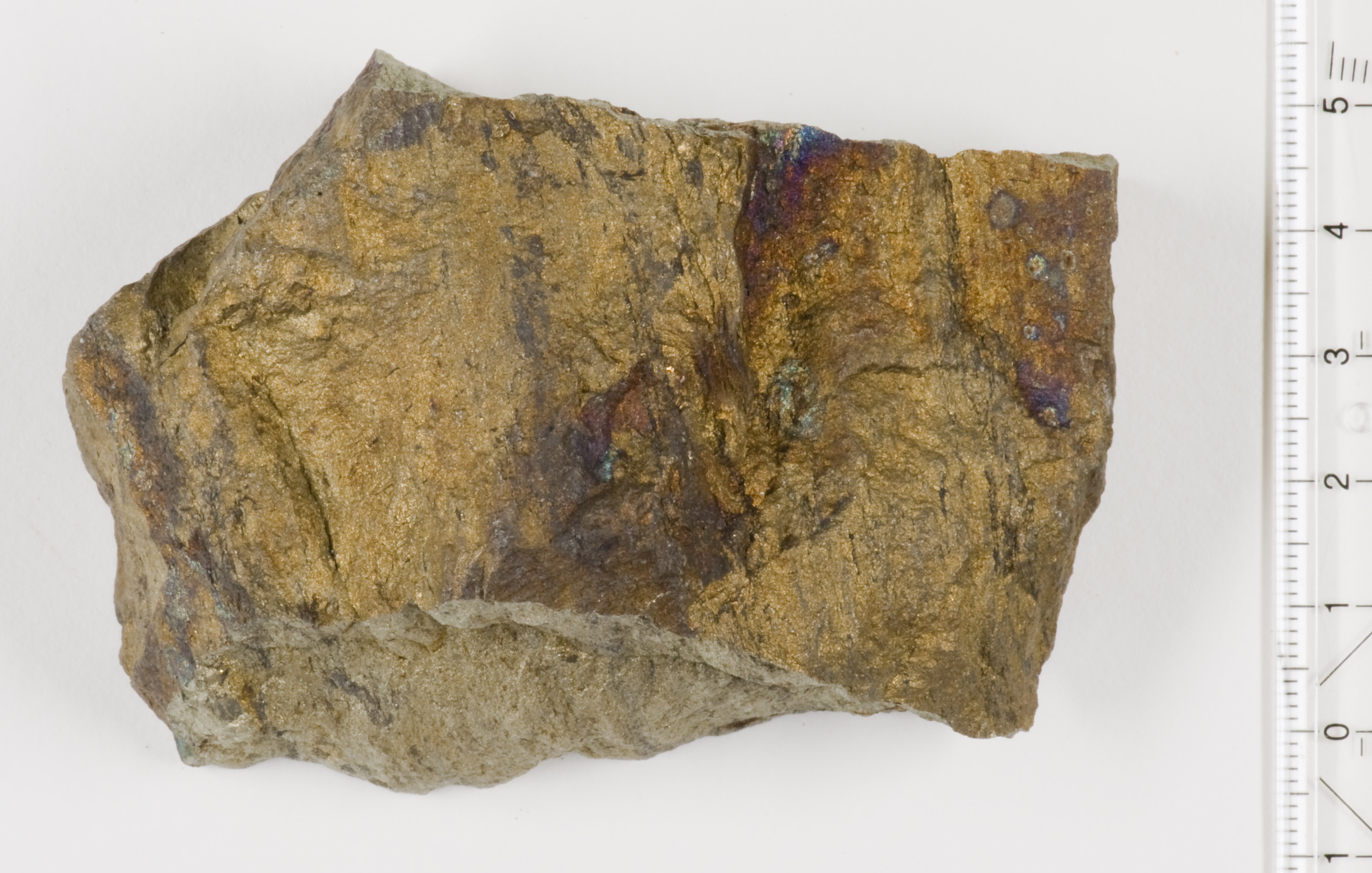 Copper ore, Rammelsberg, Goslar, Harz, Germany